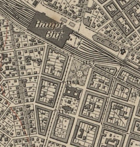 Der Bismarckplatz in Dresden und Umgebung, 1904 (heute Friedrich-List-Platz)